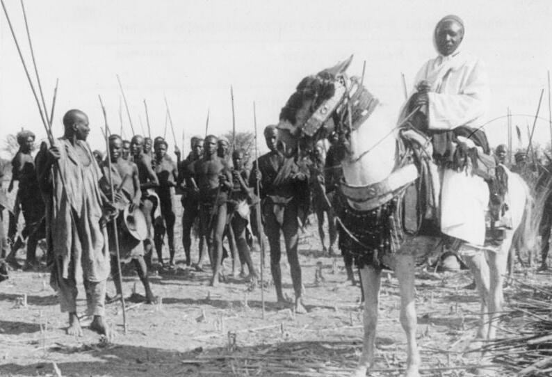 Kamerun. Mandara. Der Sultan Bukar, der gekommen ist zur Begegnung mit der Mission